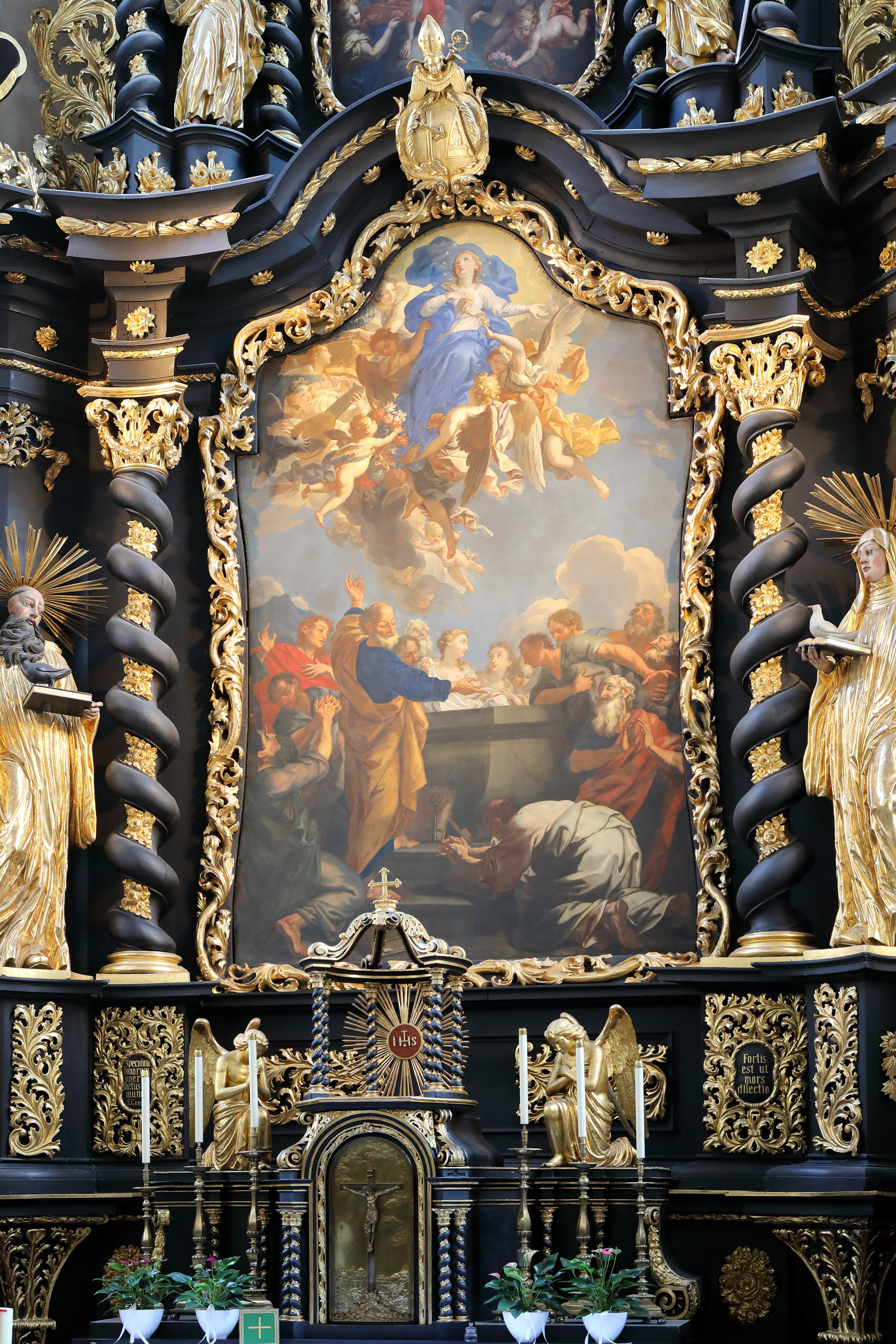 Hochaltarbild der Stifts- und Pfarrkirche Maria Himmelfahrt im Benediktinerstift in der niederösterreichischen Marktgemeinde Seitenstetten. Das Gemälde auf Leinwand mit dem Thema „Mariae Himmelfahrt“ wurde 1706 von Carl Reslfeld gemalt.